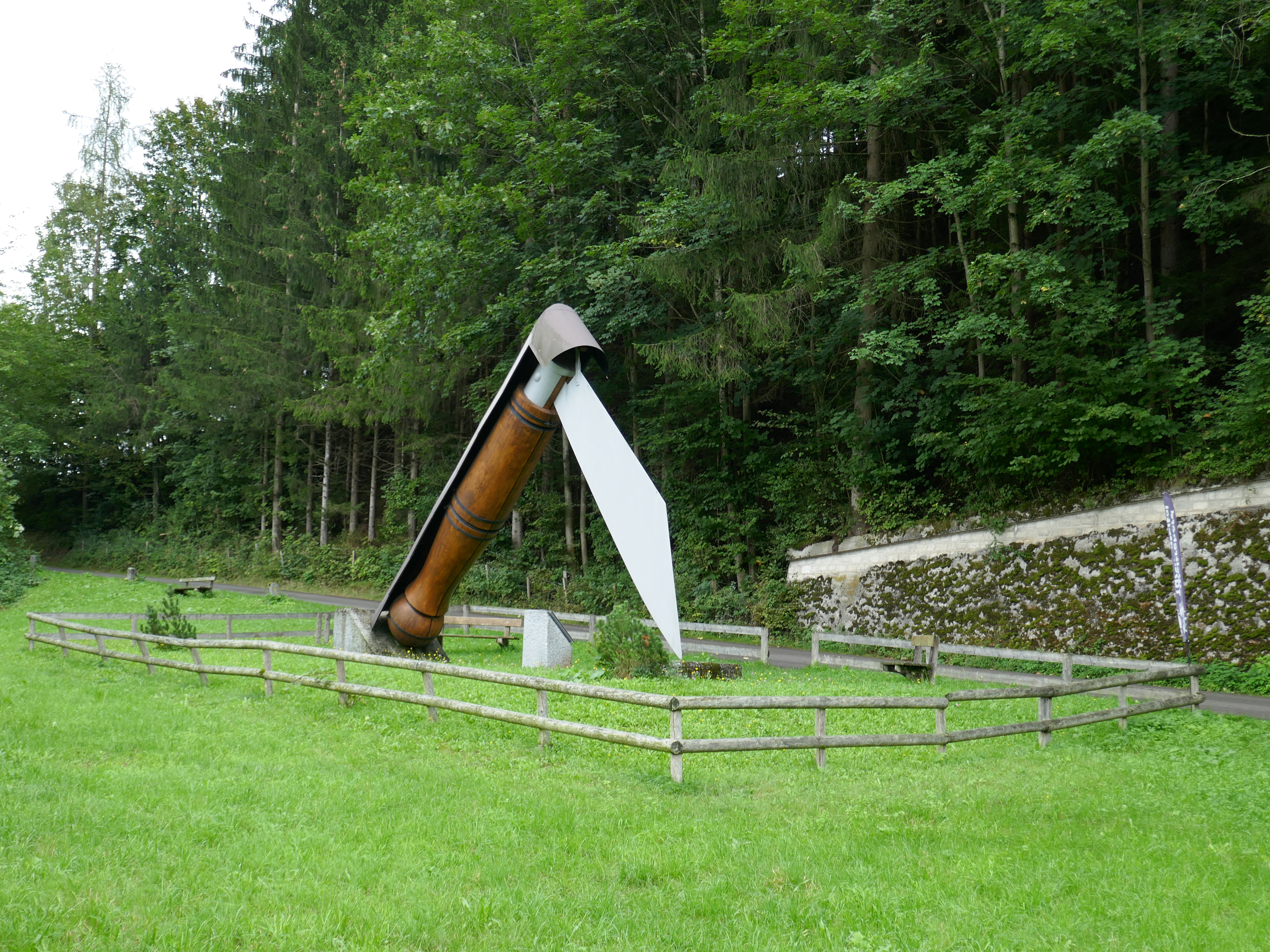 Im Tal der Feitelmacher, Trattenbach - Weltrekordfeitel (Trattenbacher Zauckerl).